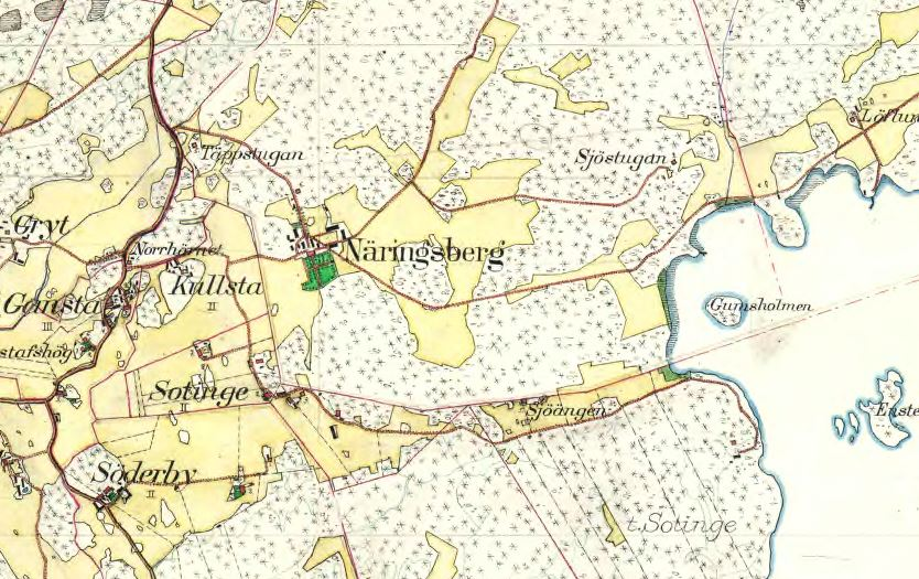 Näringsberg på Häradsekonomiska kartan